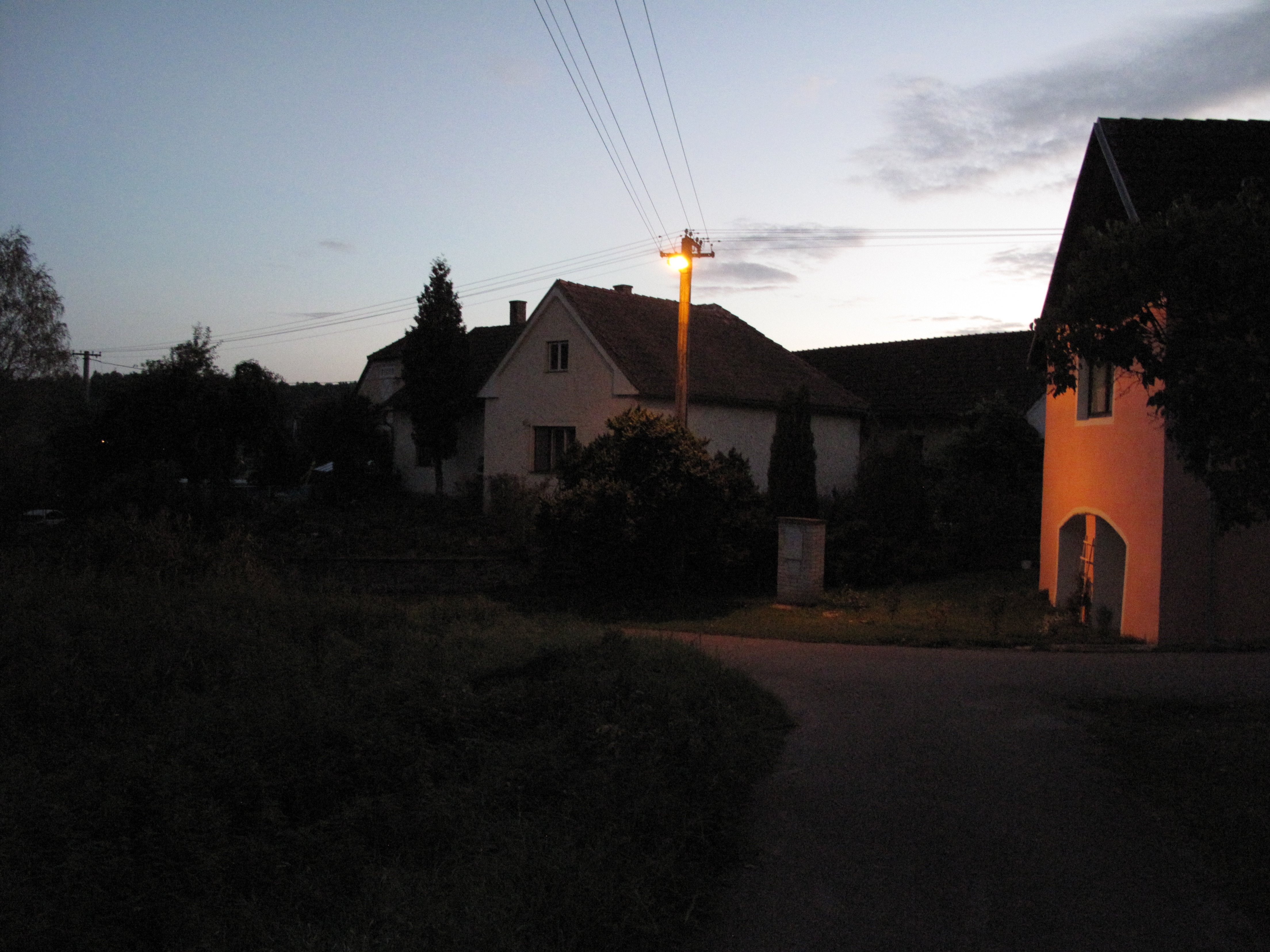 Vysoký dům v Pašovicích. Okres České Budějovice, Česká republika.